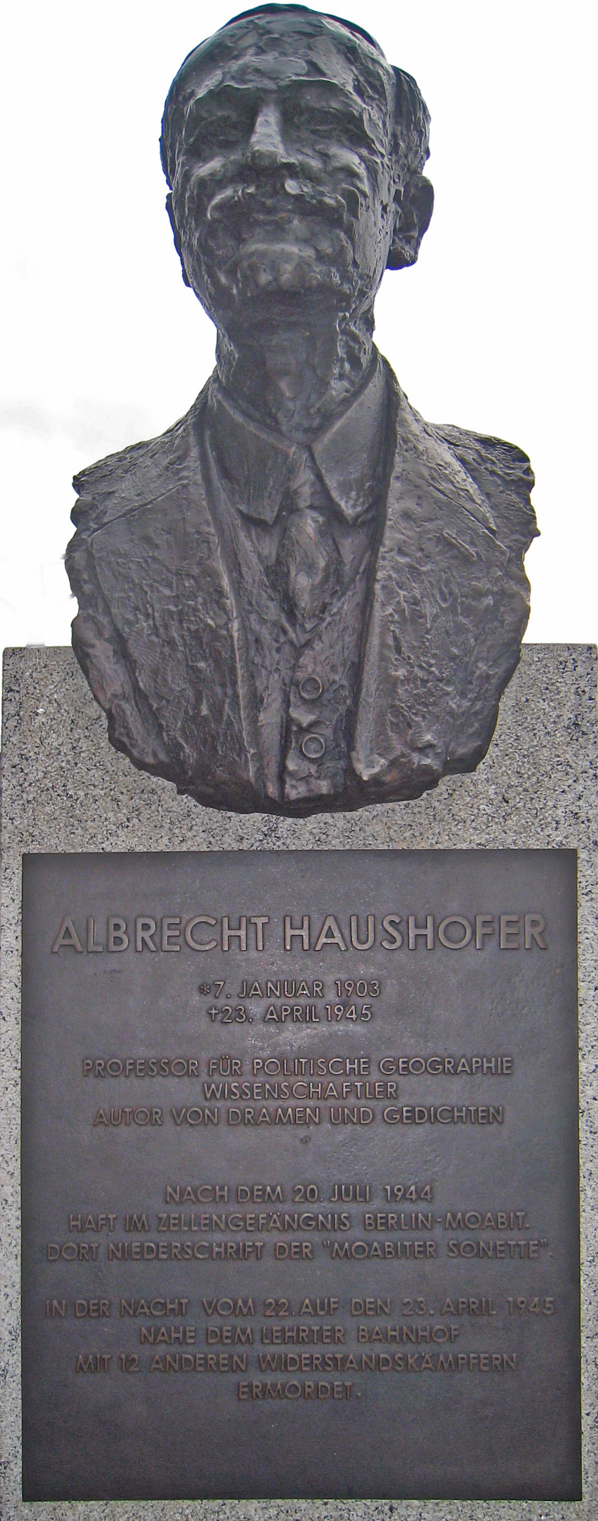 Denkmal Albrecht Haushofer vor dem Innenministerium Berlin, Straße der Erinnerung